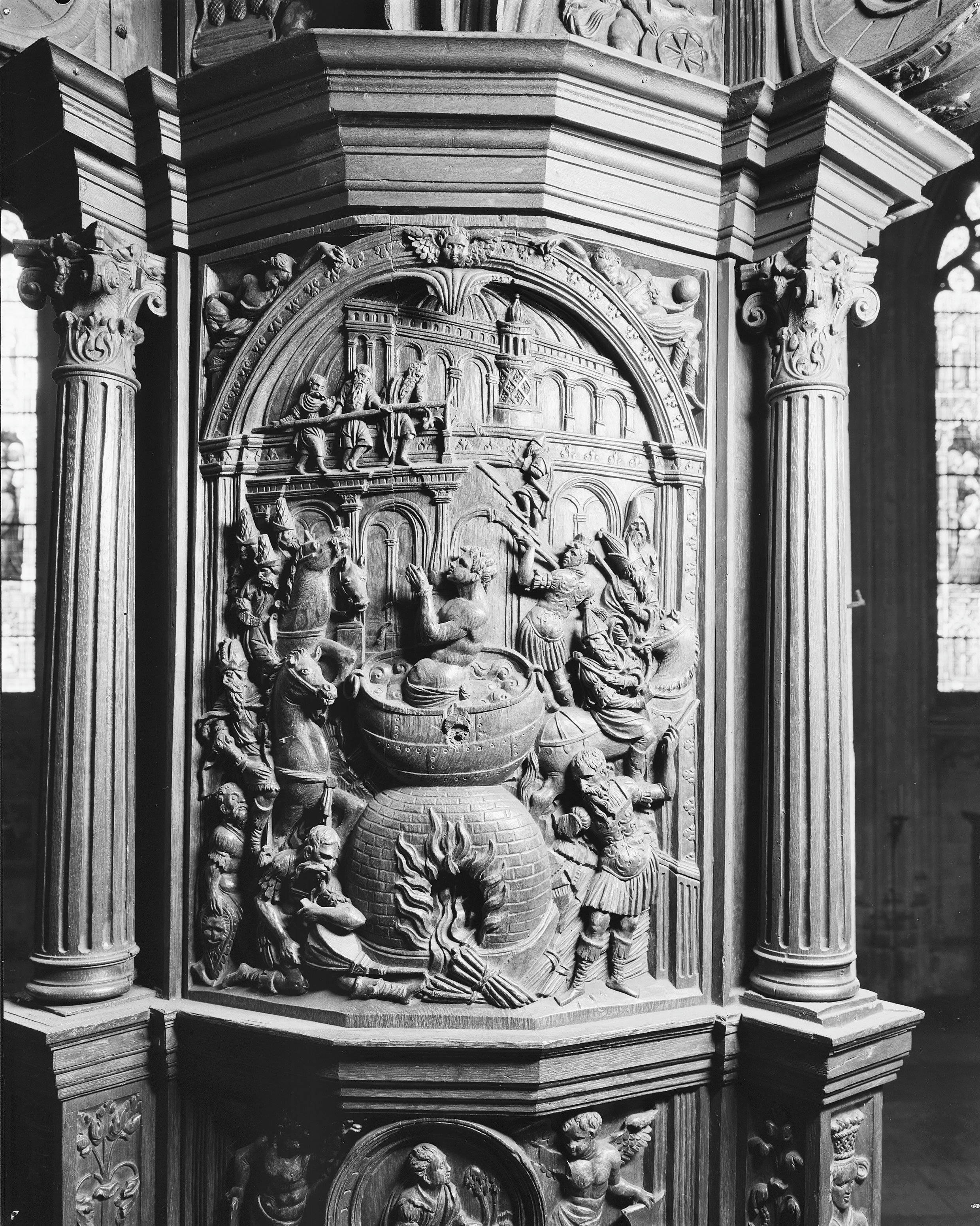 Sint Janskathedraal: INT. PREEKSTOEL, DETAIL (JOHANNES EVANGELIST IN DE KOKENDE OLIE)